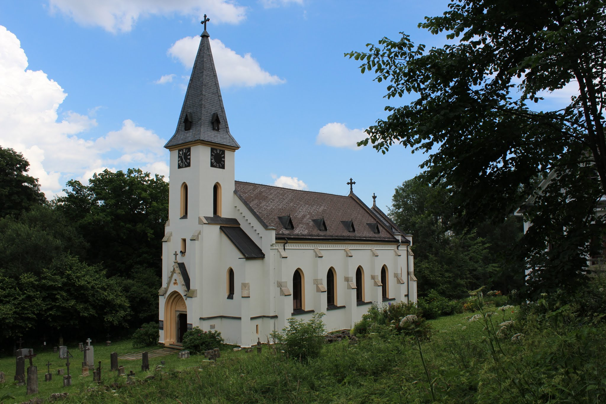 Church in Zvonkova